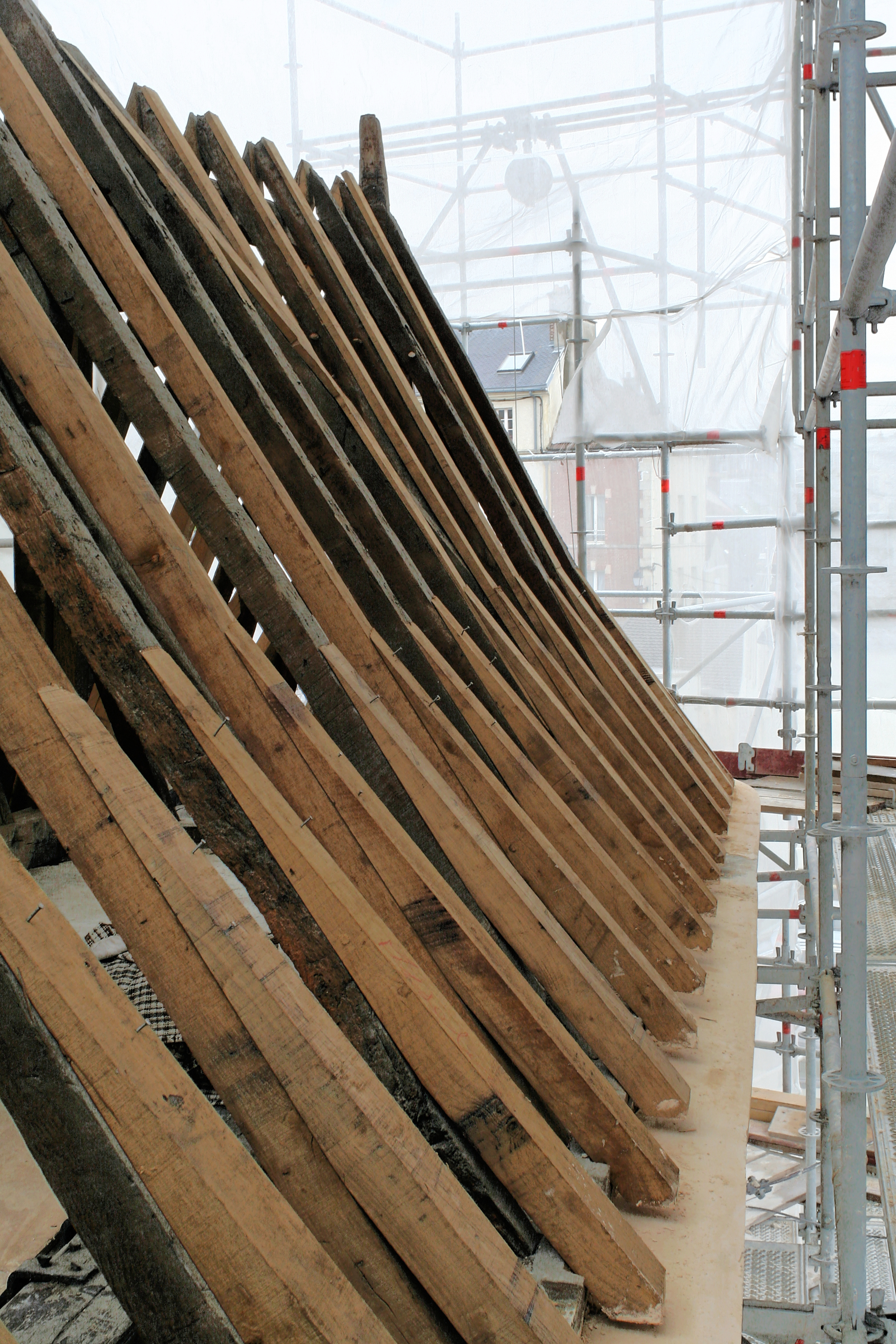 Pontoise (Val-d'Oise, France) : Charpente de la sacristie de l'église Notre-Dame de Pontoise, chevrons, fourrures, coyaux.